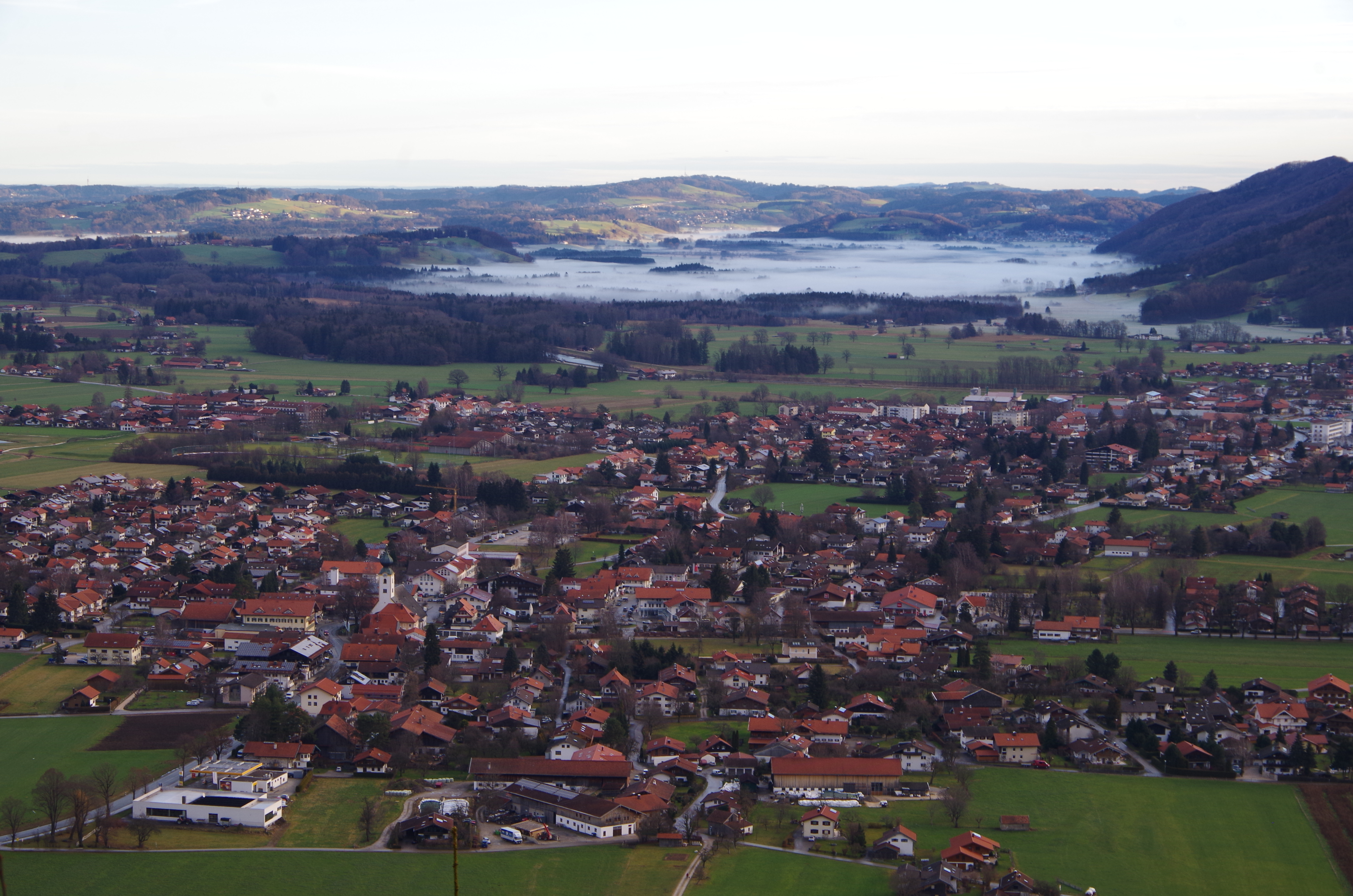 Blick auf Grassau von der Zeppelinhöhe. Im Hintergrund unter Nebel das Egerndacher Filz.